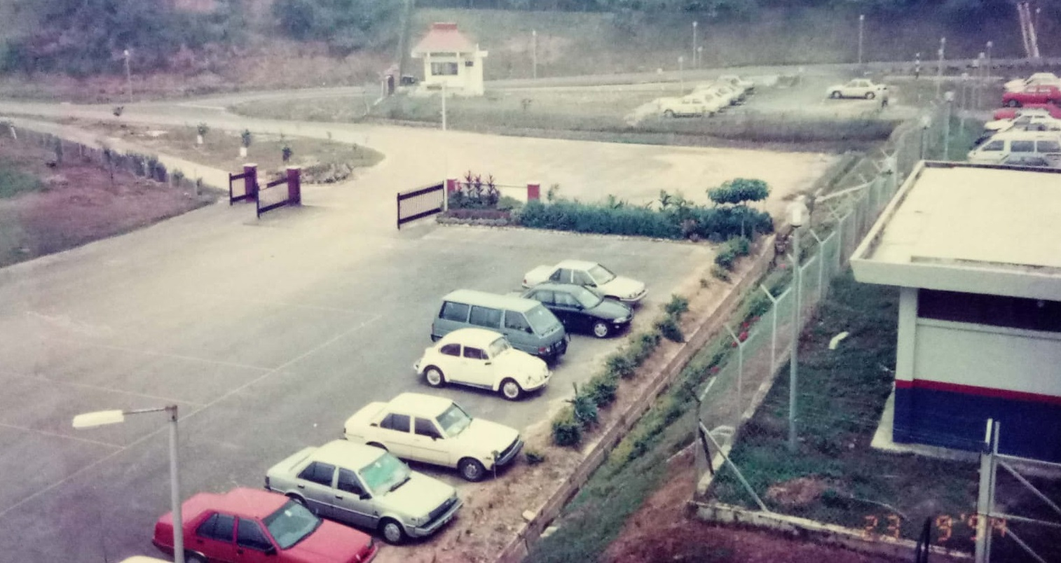 Tempat Letak kereta tahun 90an